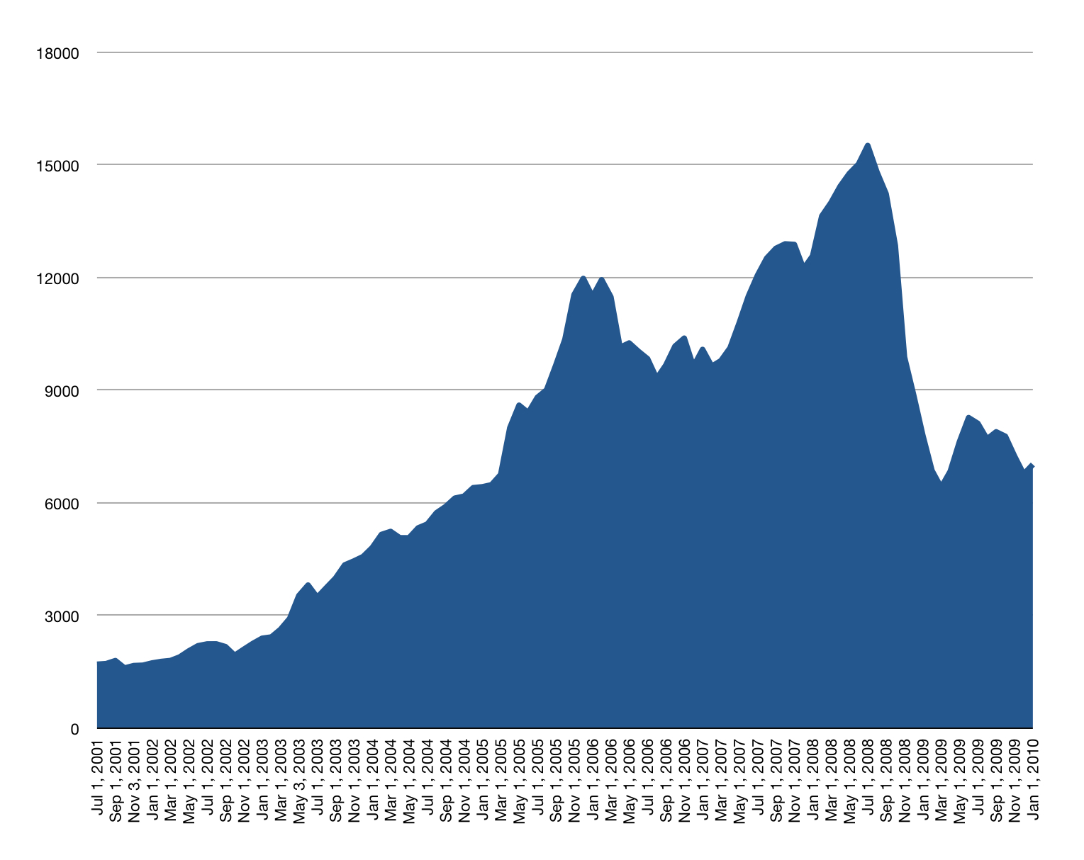 تصنيف:اقتصاد الكويت